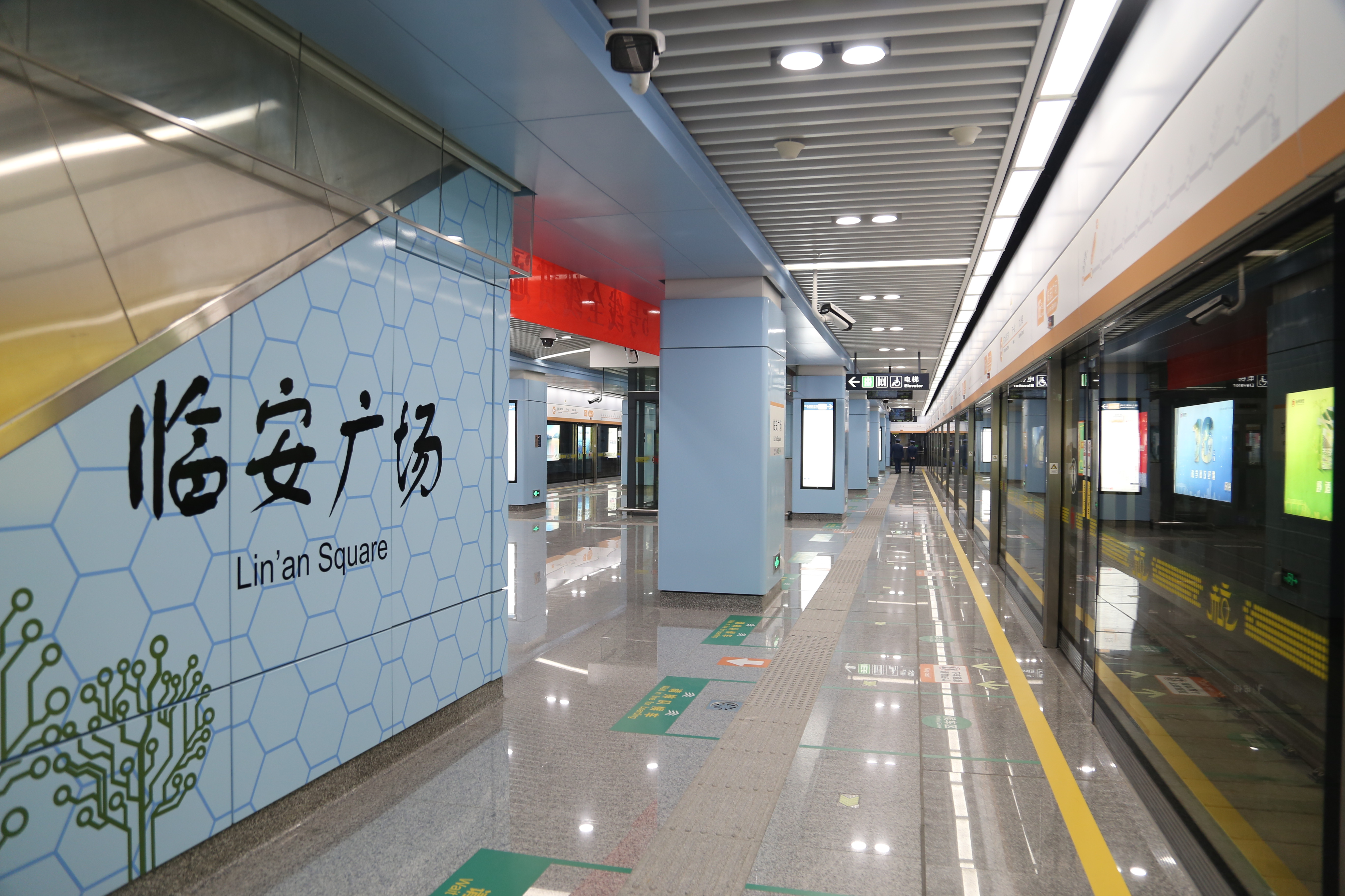 临安广场站站台与大字壁